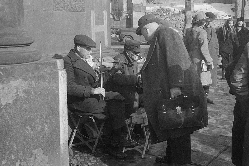 Original image description from the Deutsche FotothekStraßenmusiker und Passanten